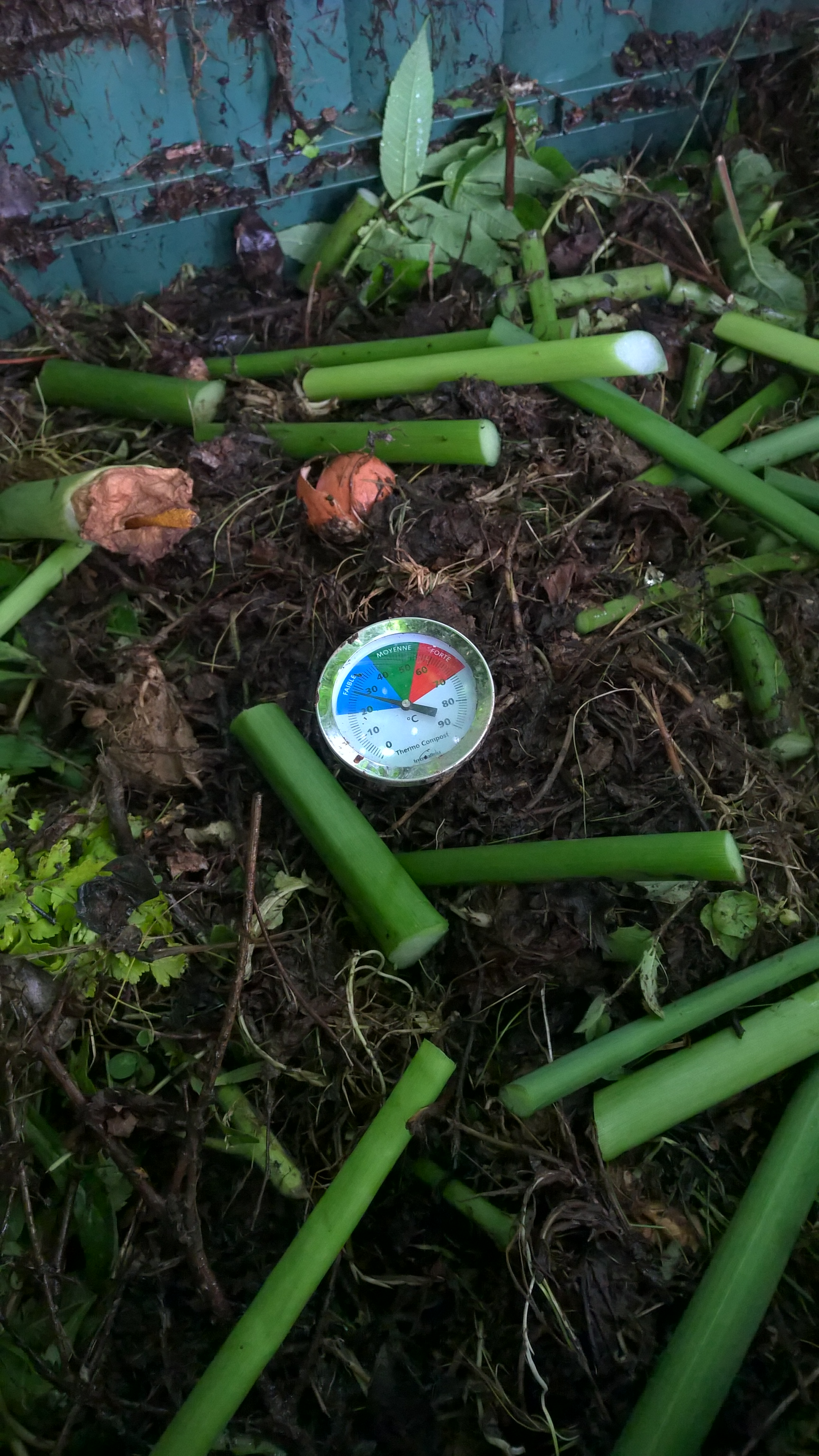 Mesure de température du compost